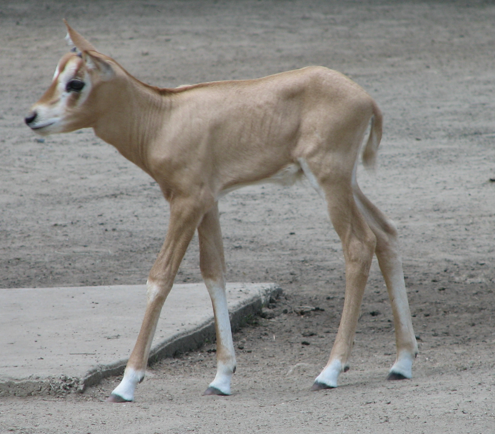 Oryx Dammah Baby